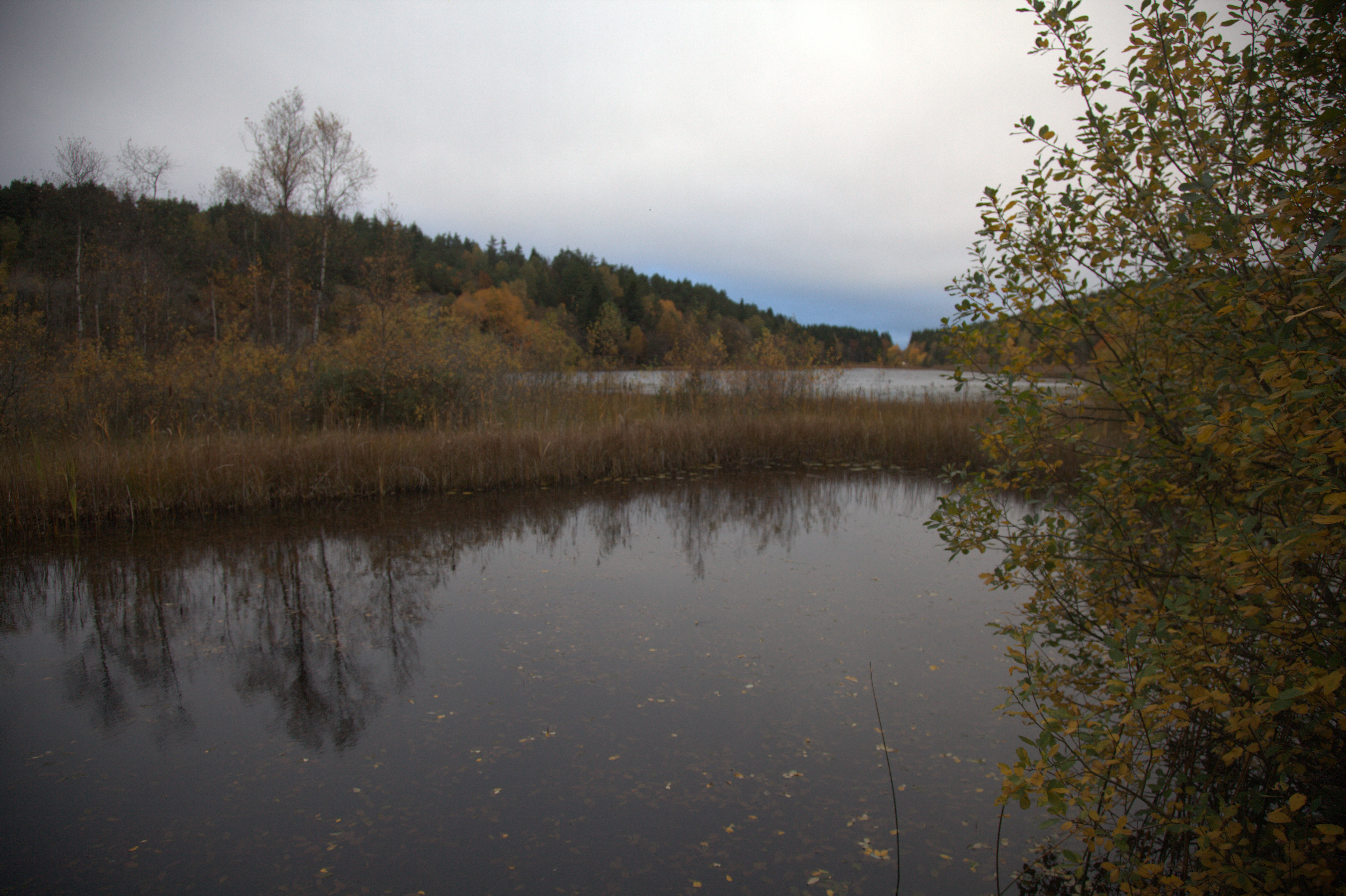 Vy över sjön Tvibotten i Kungälvs kommun. Syvöstra stranden.